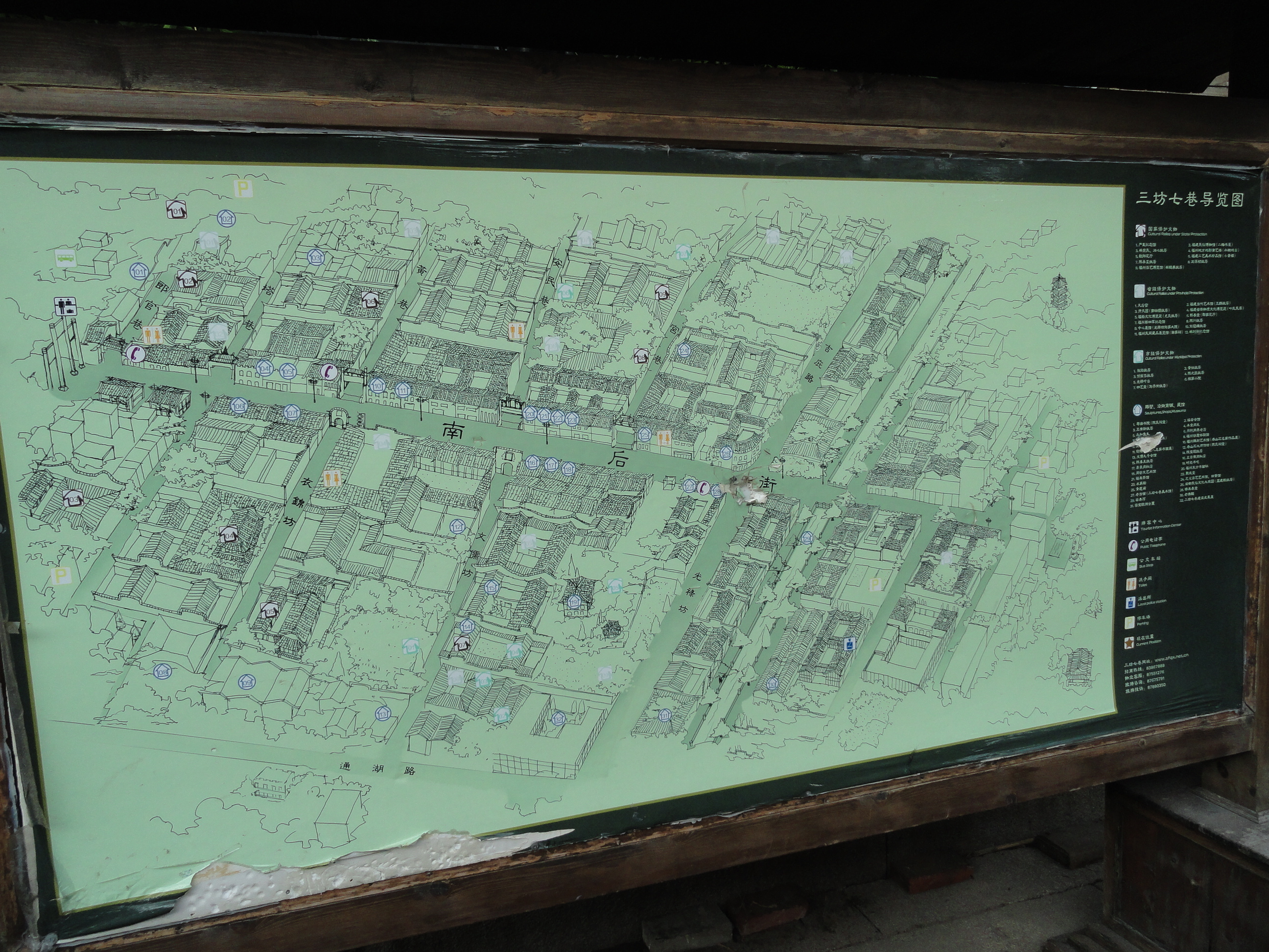 中文（中国大陆）: 福州三坊七巷导览图